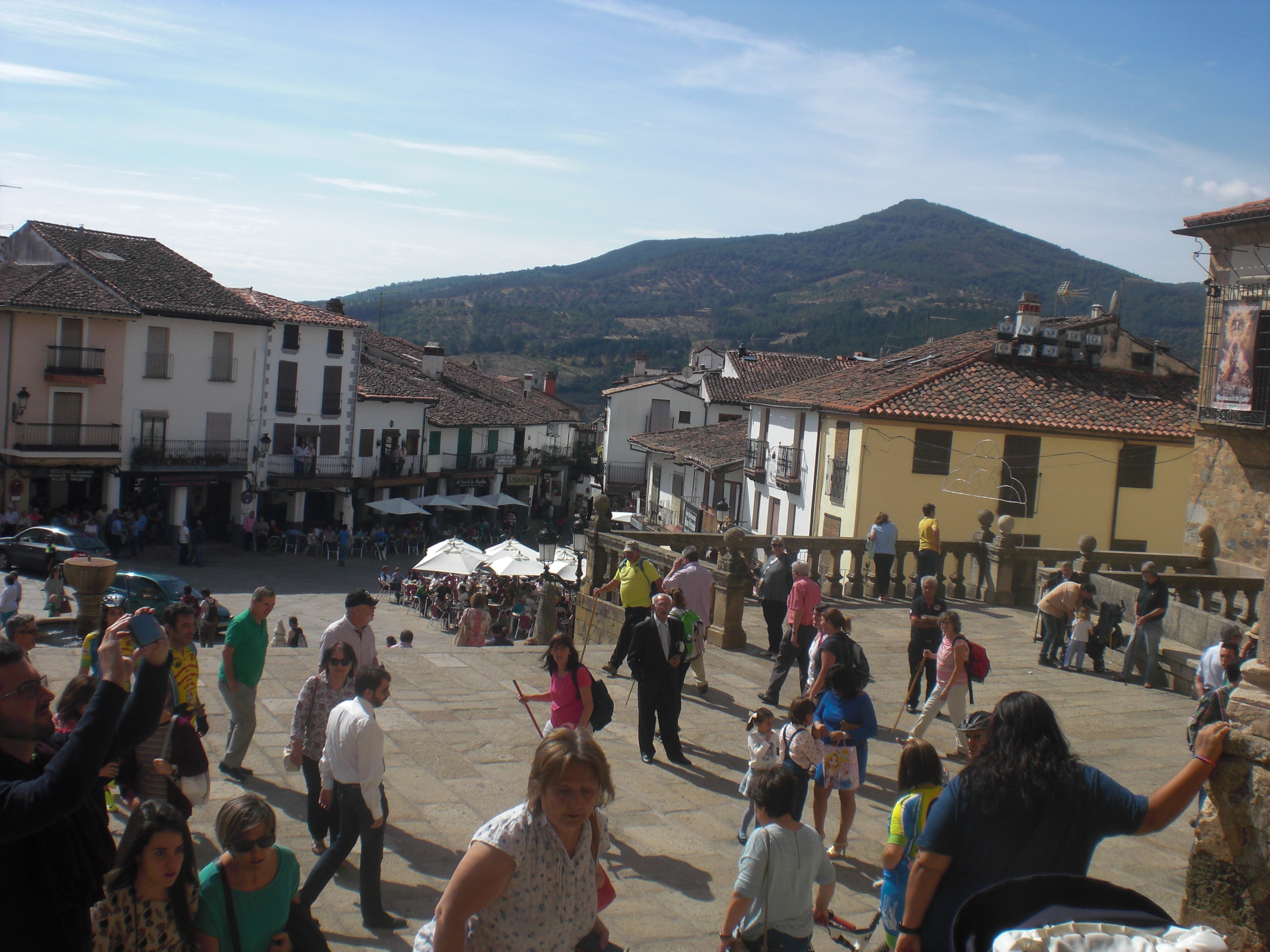 placo de guadalupe